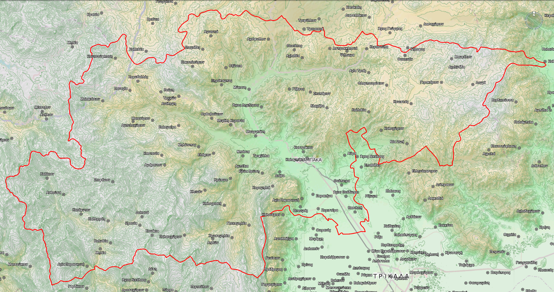 Τοπογραφικός χάρτης του Δήμου